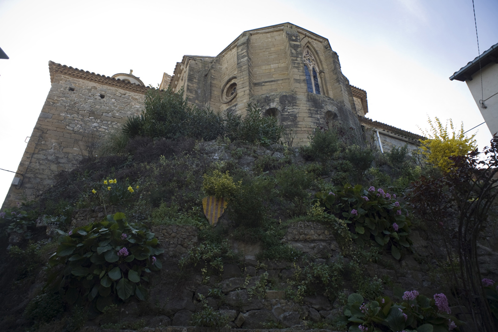 Cultural Heritage Spain